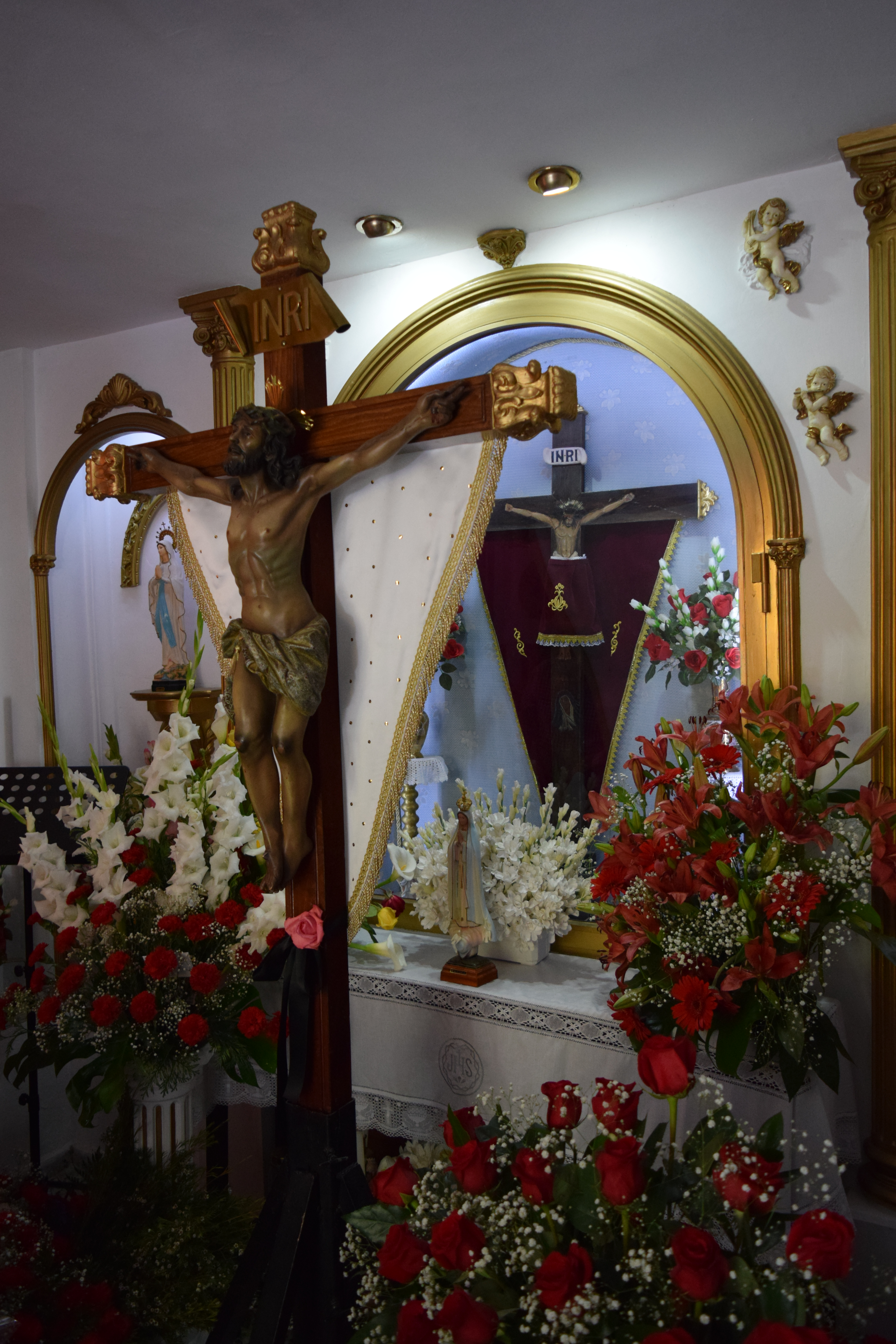 El Santo Cristo de Charcales en el día de su romería el 14 de mayo de 2017. Delante, la imagen que se procesiona, y detrás la cruz pintada que se considera la original